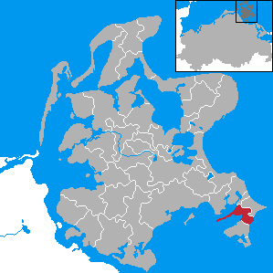 Middelhagen, Landkreis Rügen, Mecklenburg-Vorpommern